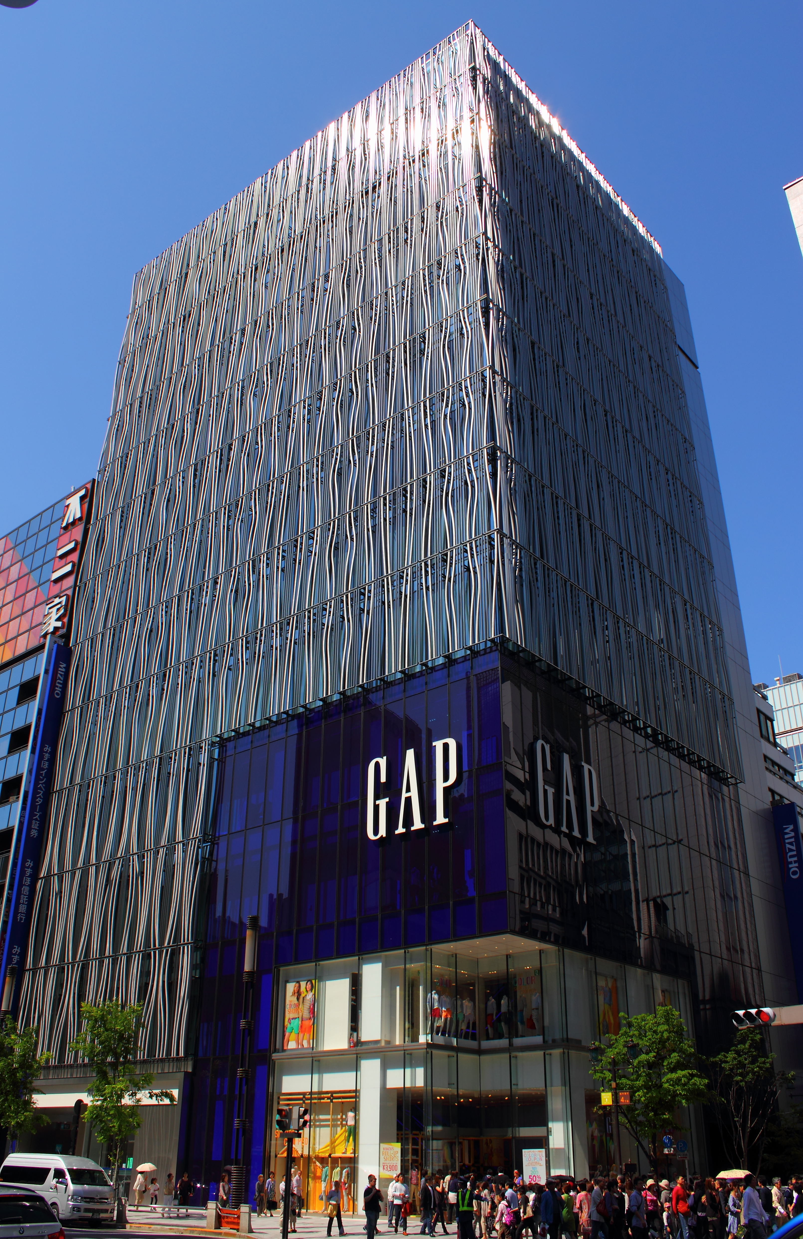 Gapフラッグシップ銀座（東京都中央区銀座）